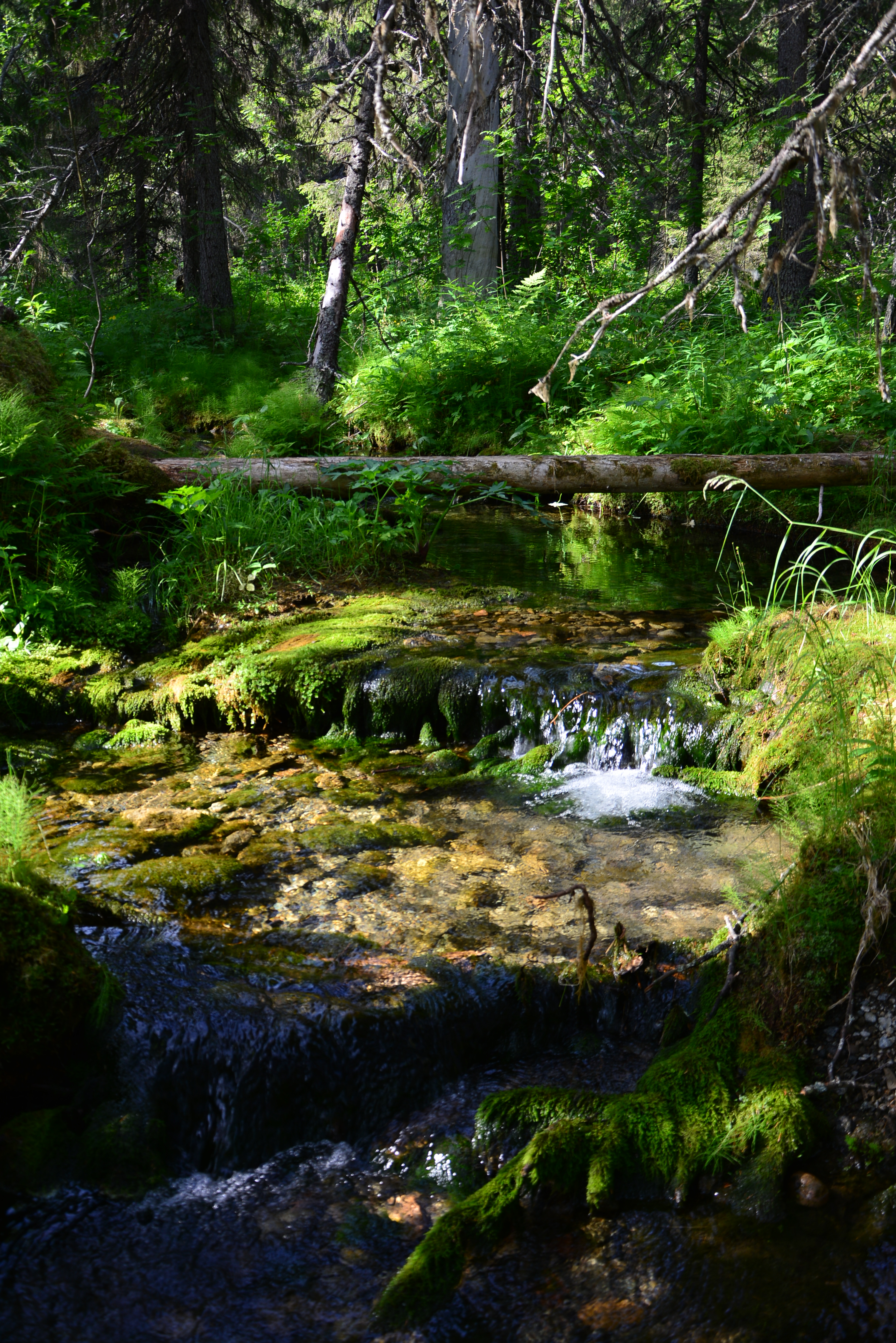 Сейдъявврь, Ловозерский район This image is related to the protected area of Russia number 5110096